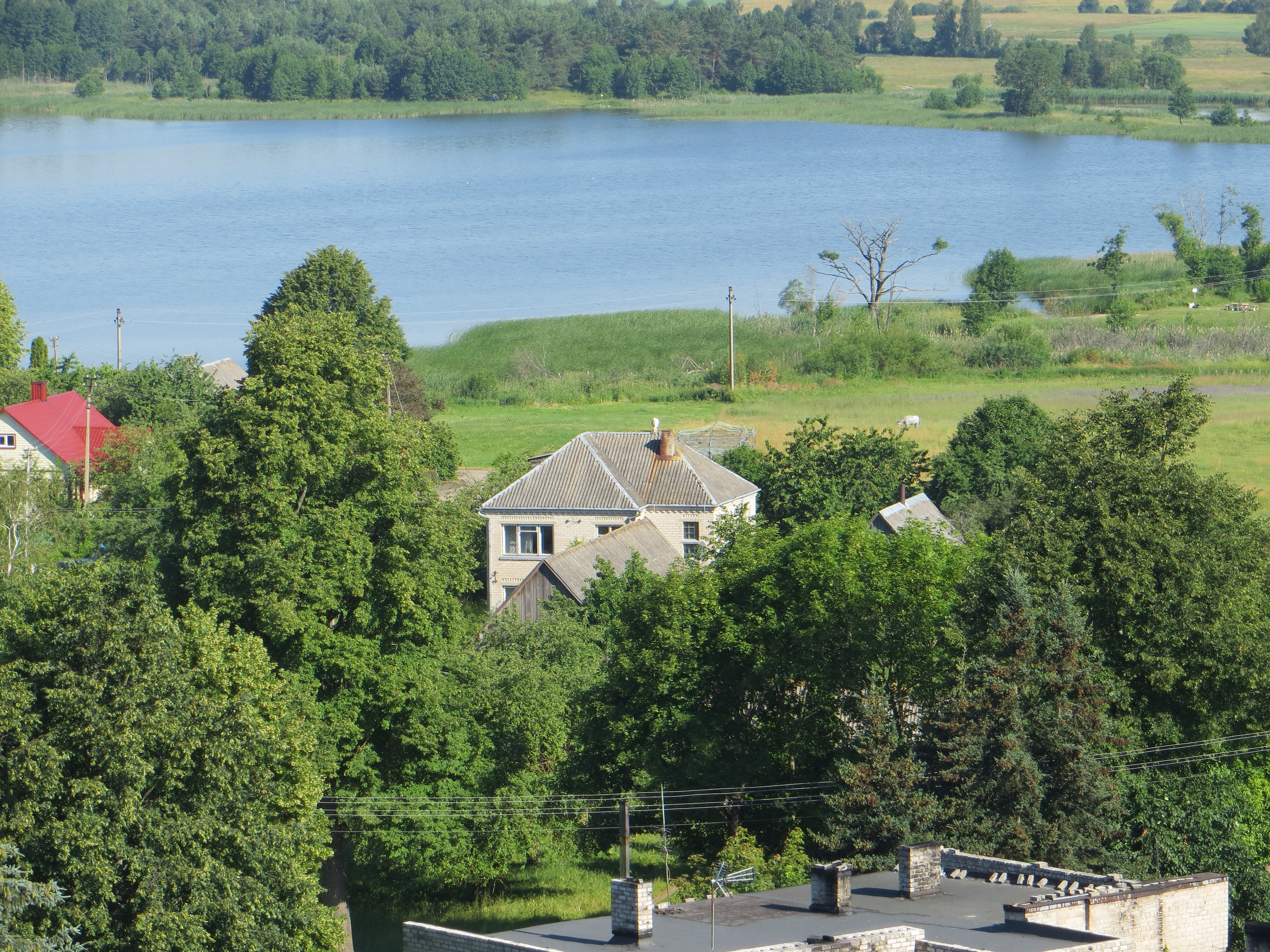 Kančėnai, Lithuania